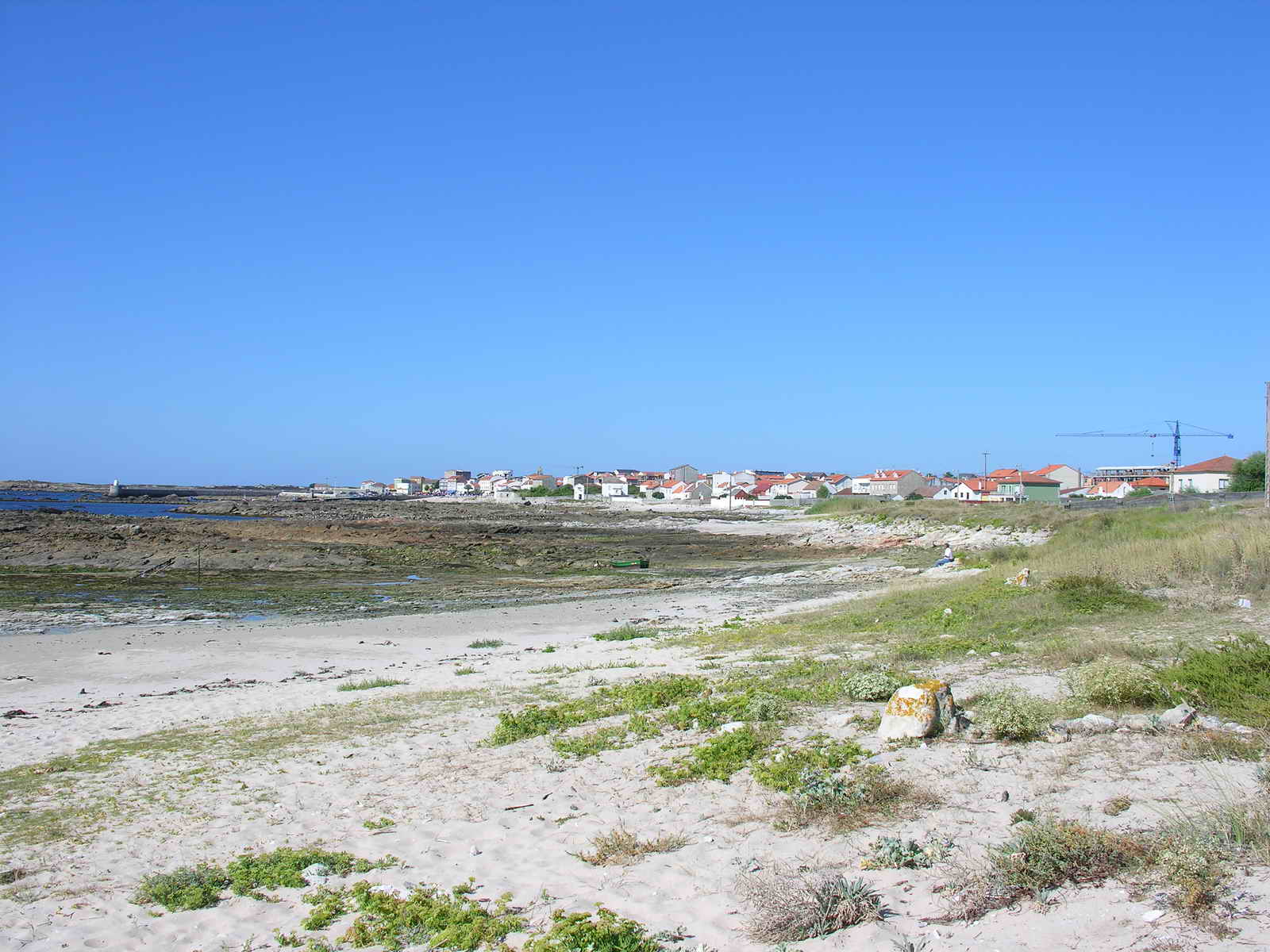 Castiñeiras - Ribeira - Galicia - Spain